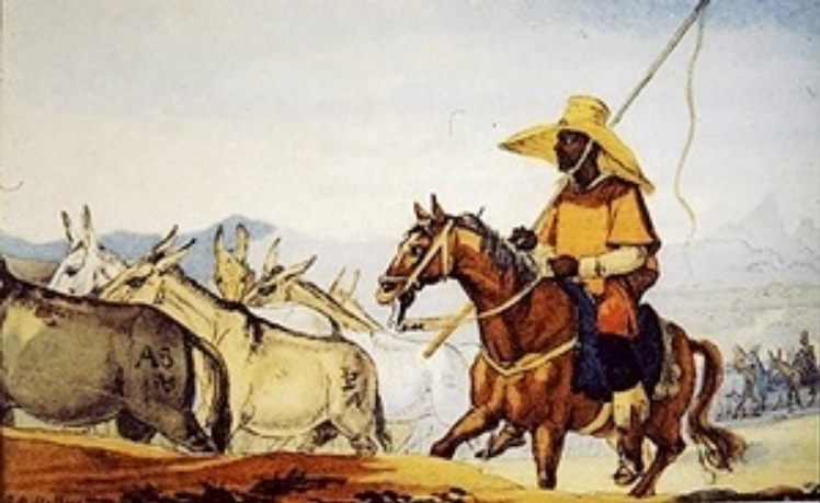 Escravo negro conduzindo tropas na Província do Rio Grande